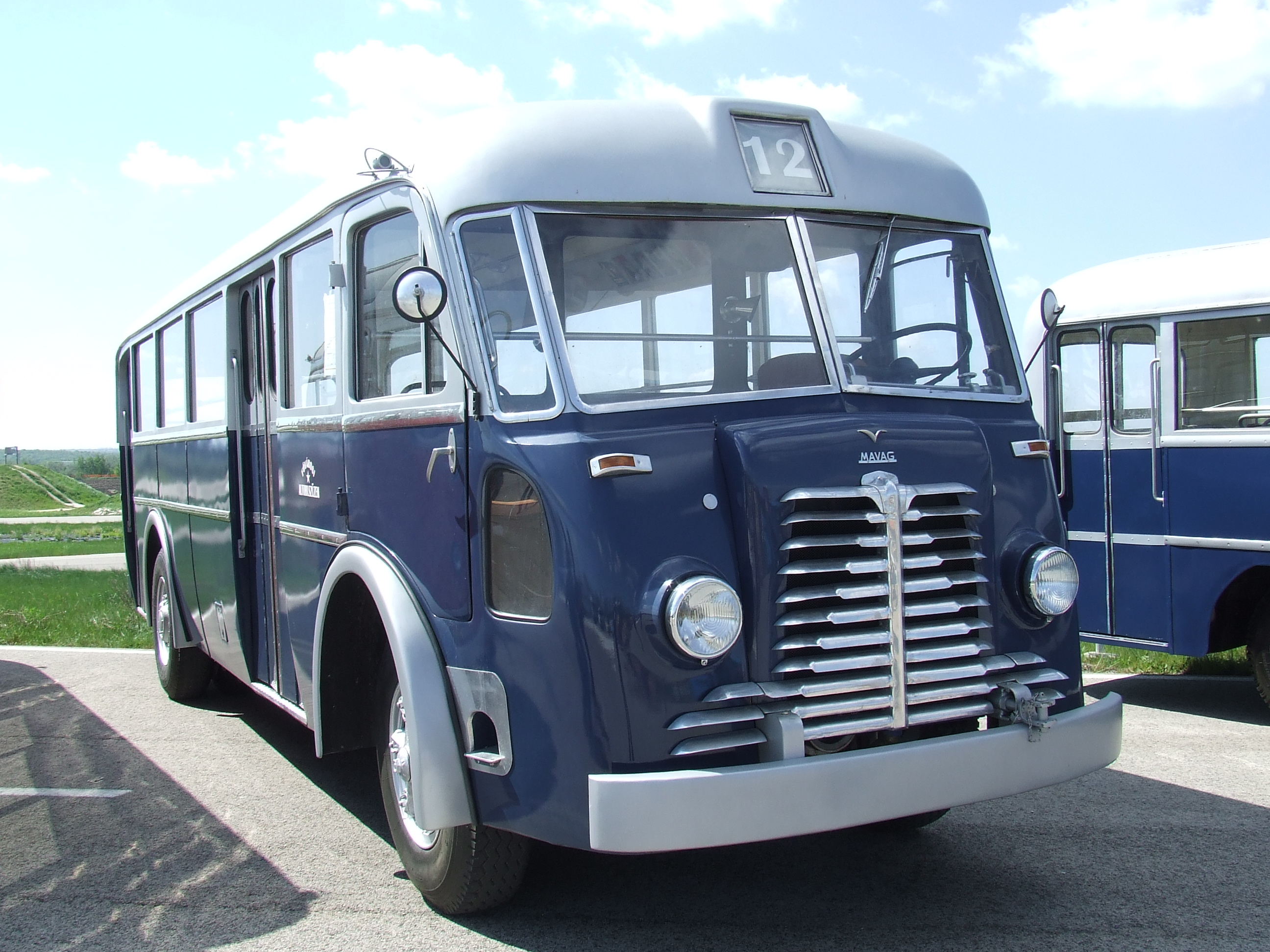 Mávag, Busexpo 2016, Zsámbék